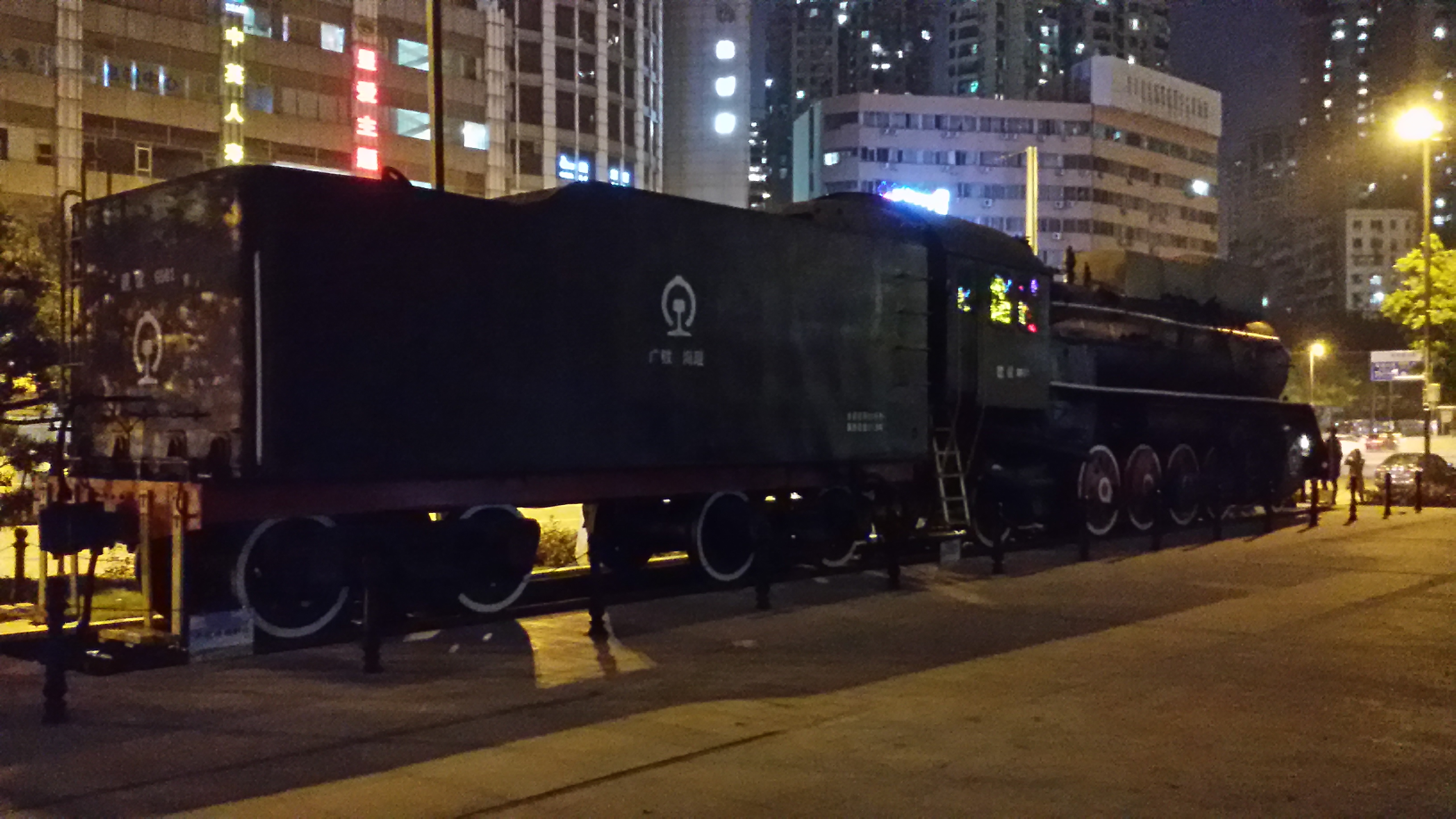 粵語: 廣九鐵路嘅YW22型綠皮車廂（拉貨）